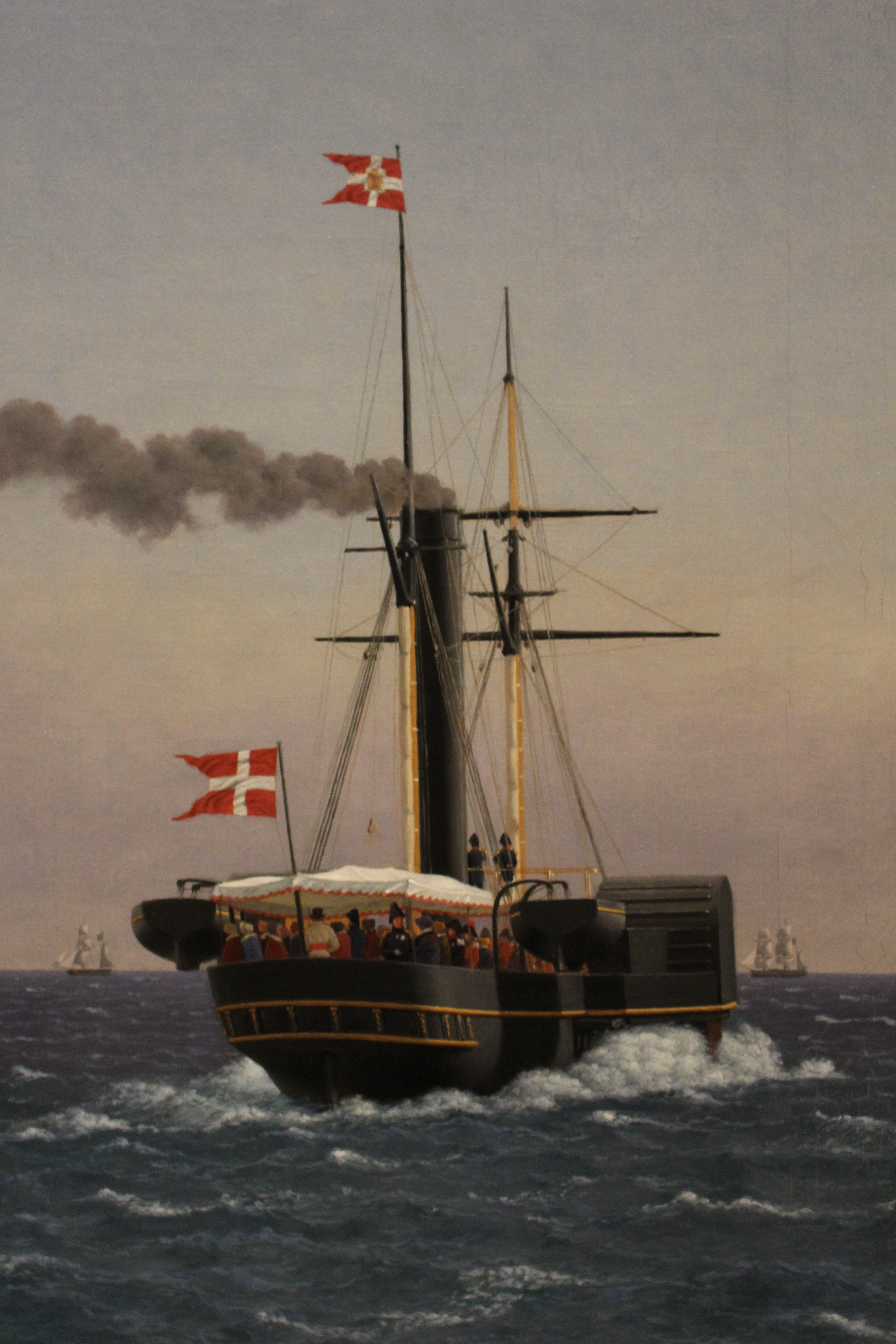 Del af C.W. Eckersbergs maleri Christian VIII med følge overværer på sit dampskib "Ægir" den 2. maj 1843 manøvreringen af en eskadre på Københavns ydre red